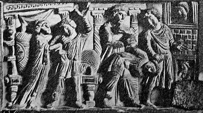 cátedra